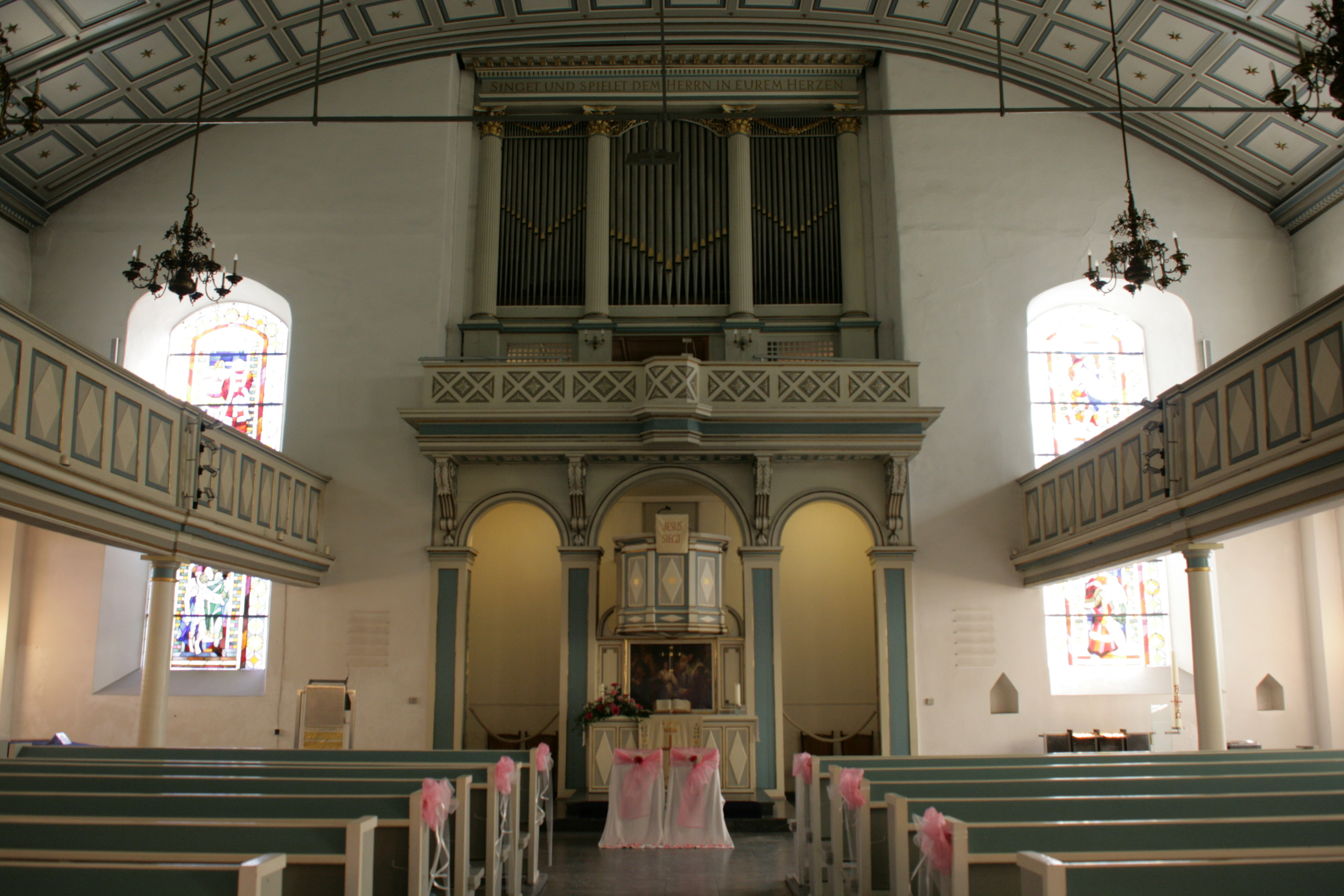 Evangelische St.-Georgs-Kirche auf dem Kirchplatz in Hattingen